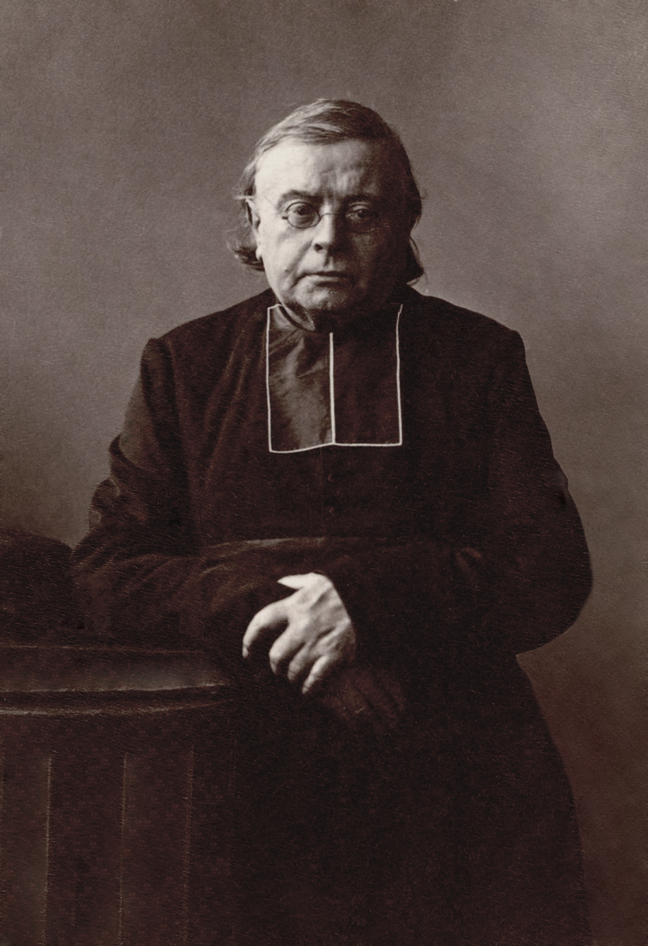 L'abbé François Moigno (1804 - 1884), ecclésiastique et mathématicien français